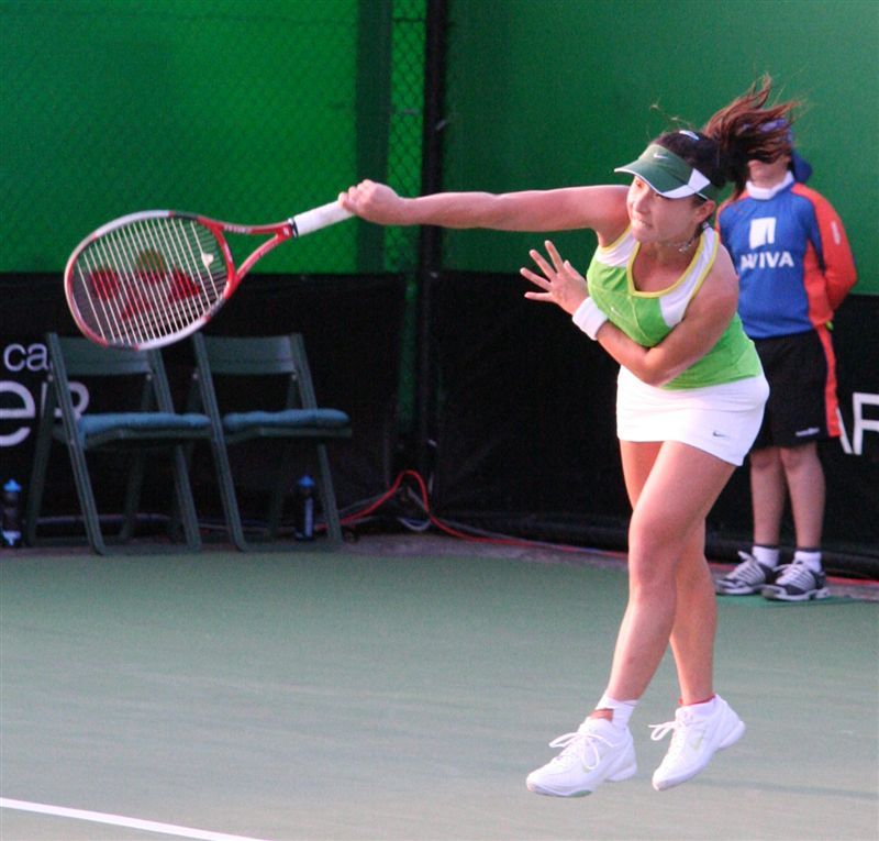 Zheng Jie, First round Australian Open 2007